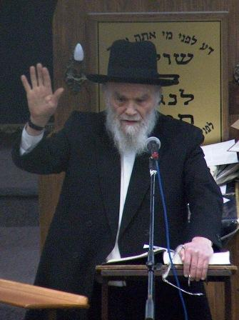 הרב משה הלל הירש